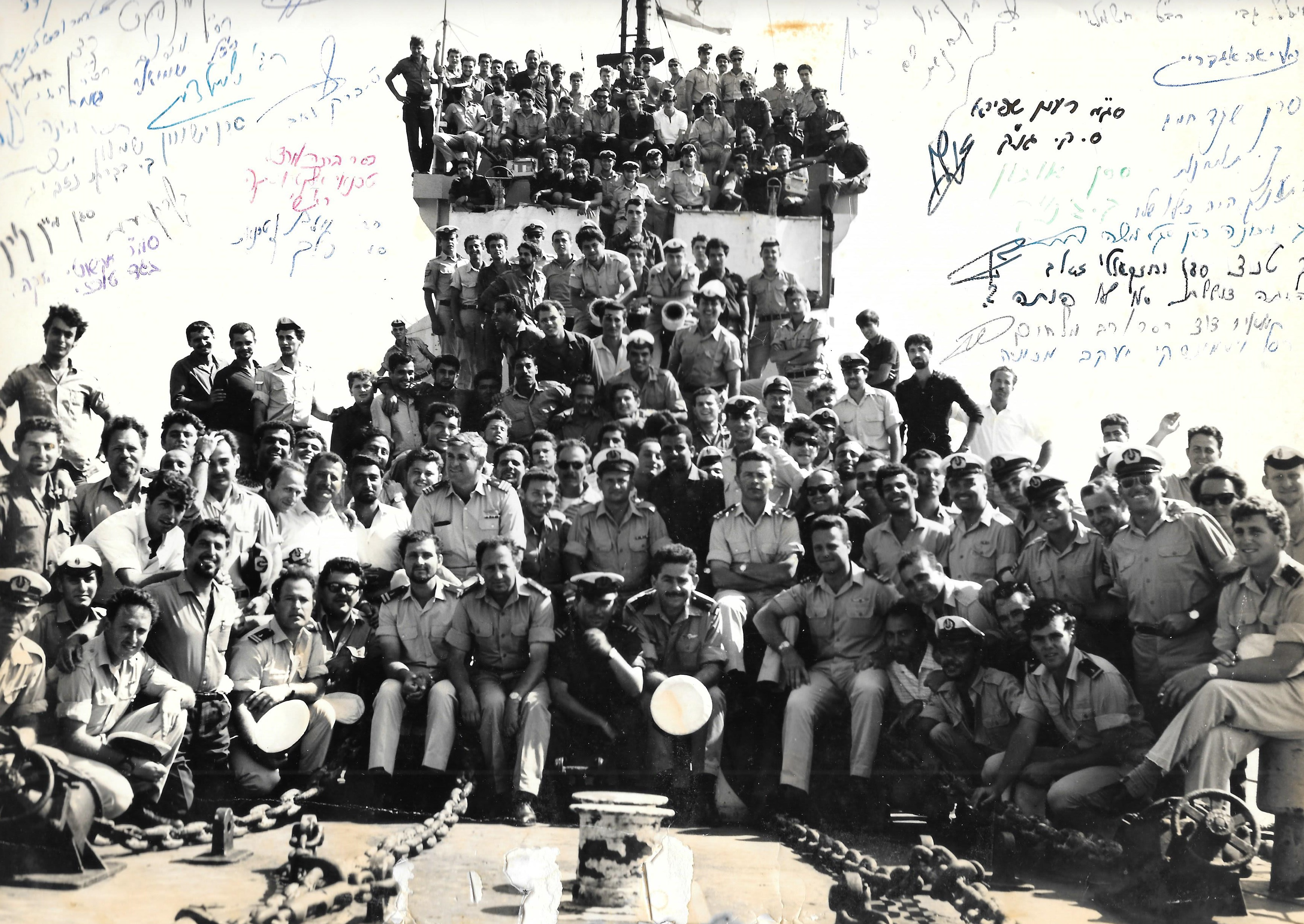 תמונה חתומה של צוות המשחתת אח"י חיפה בסיום מלחמת ששת הימים